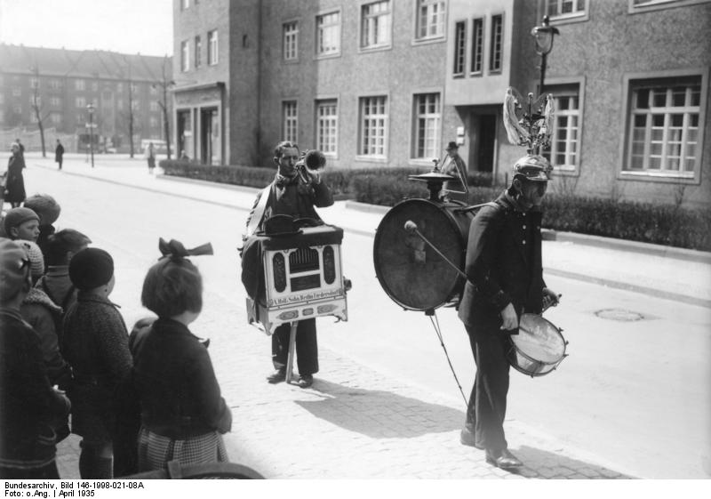 Strassenmusikanten in Berlin , im April 1935